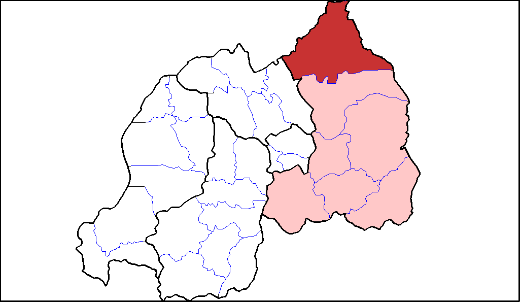 Distretto di Nyagatare.